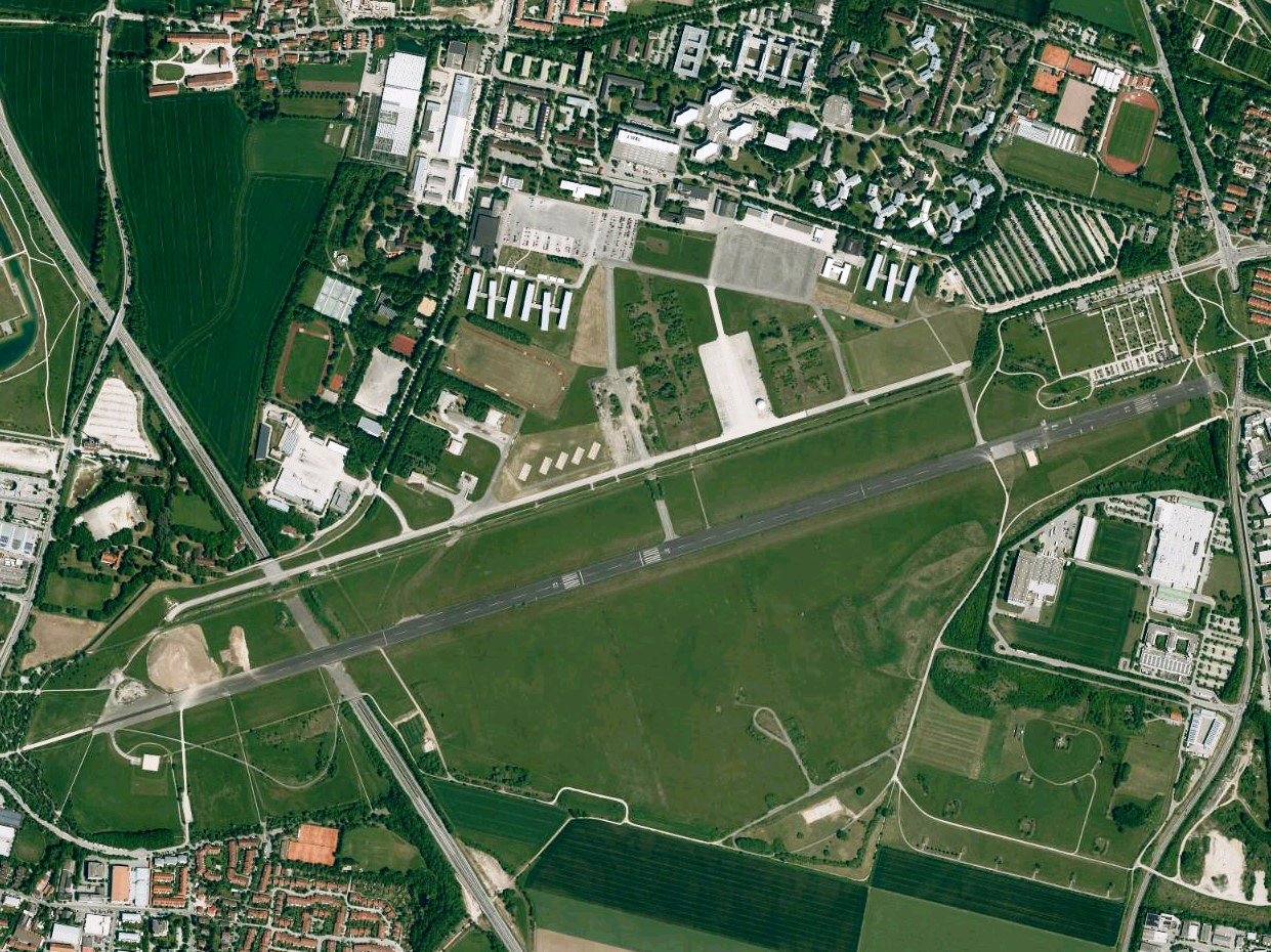 Luftaufnahme der Bayerischen Vermessungsverwaltung: Ehemaliger Fliegerhorst Neubiberg im Landkreis München, Bayern.